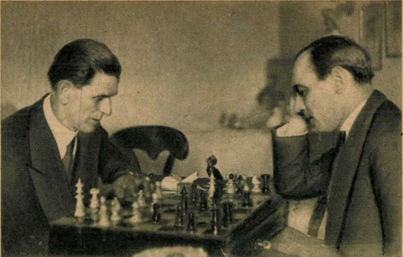 Maróczy Géza Kiss Ferenc színművésszel sakkozik (Siesta szanatórium, Budapest)